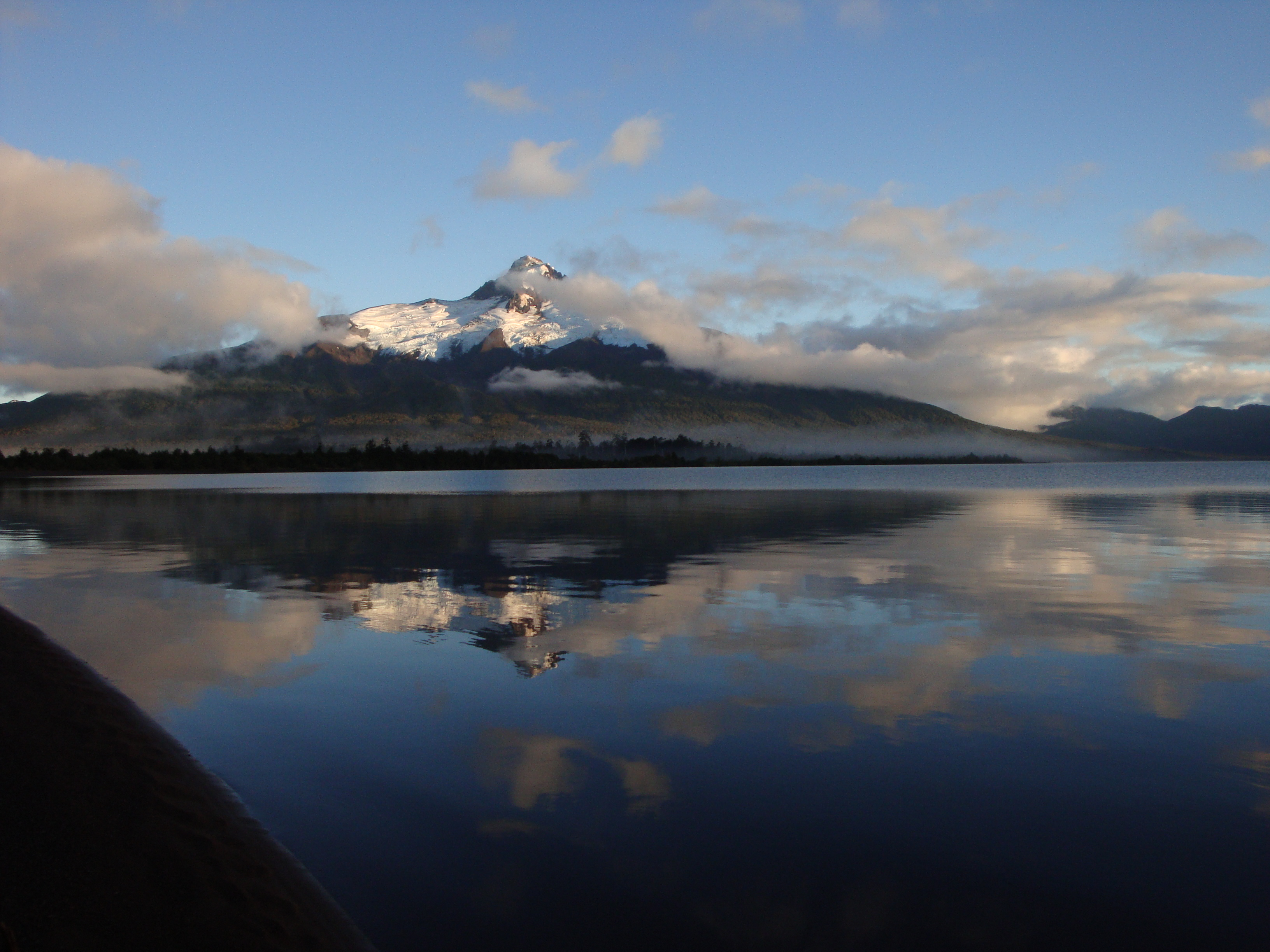 Lago Yulton, Chile.